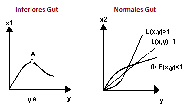 Engelkurve, verschiedene Verlaufsformen